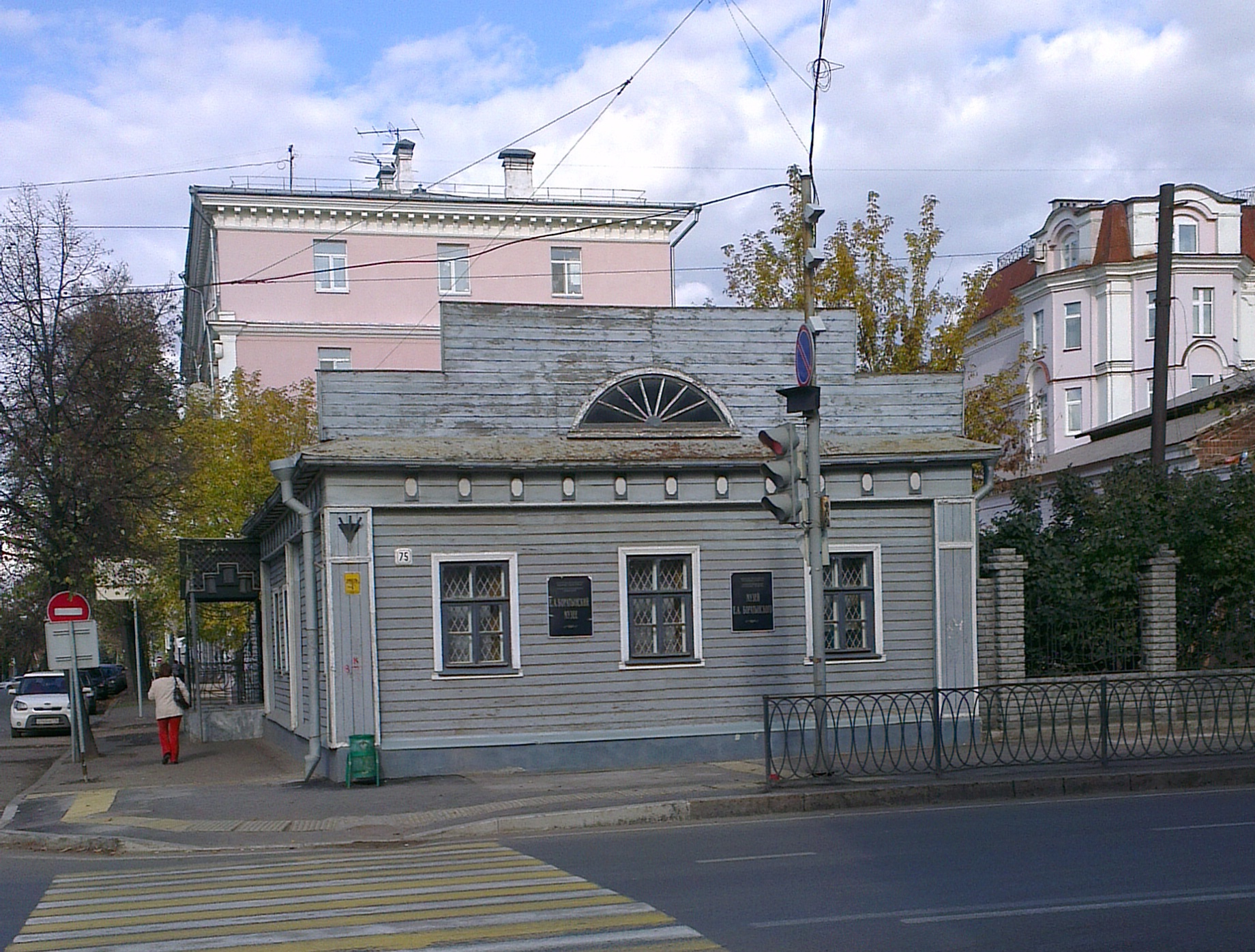 Музей-усадьба Е.А, Боратынского